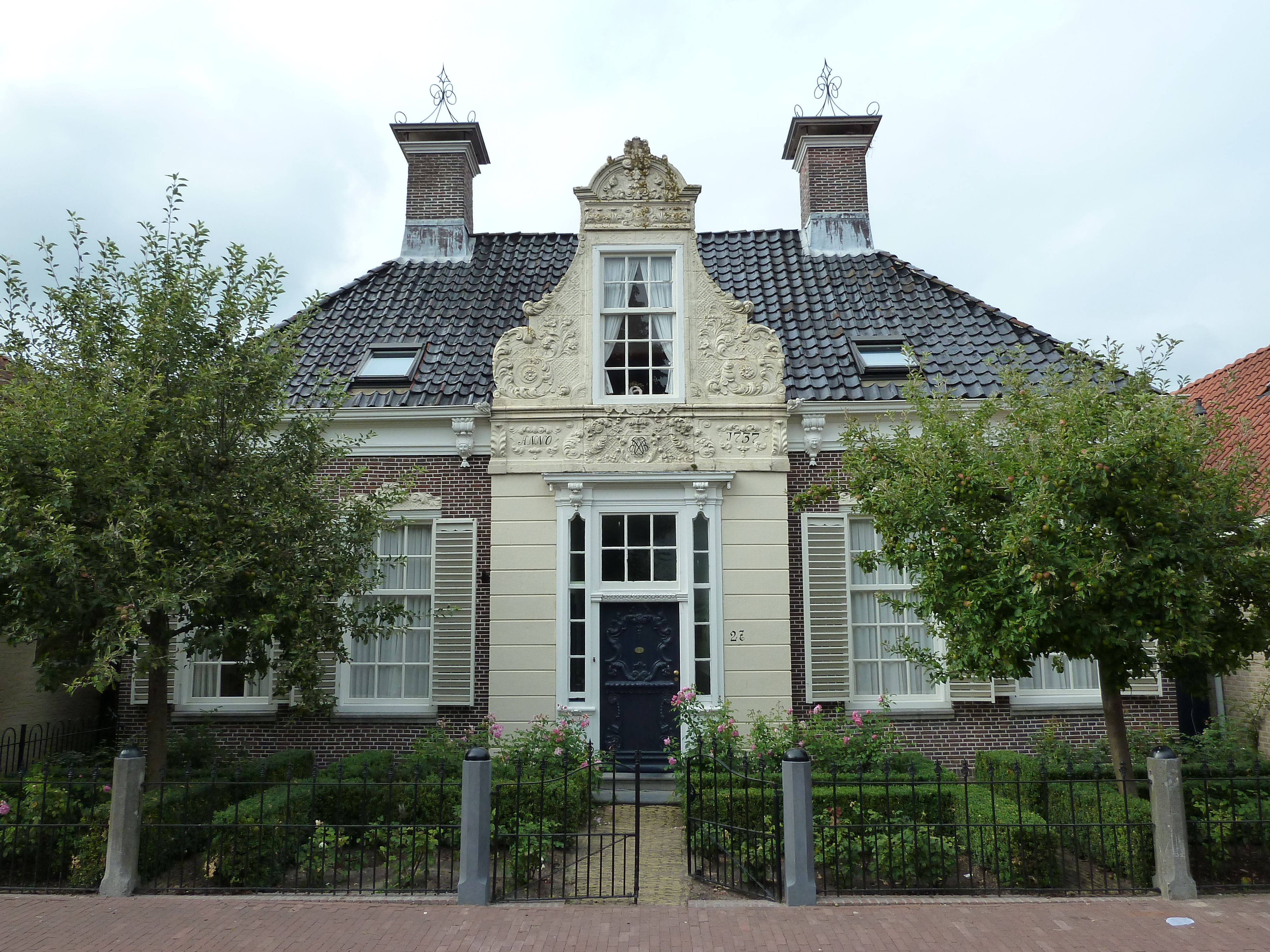 18e eeuws woonhuis in het centrum van Heeg